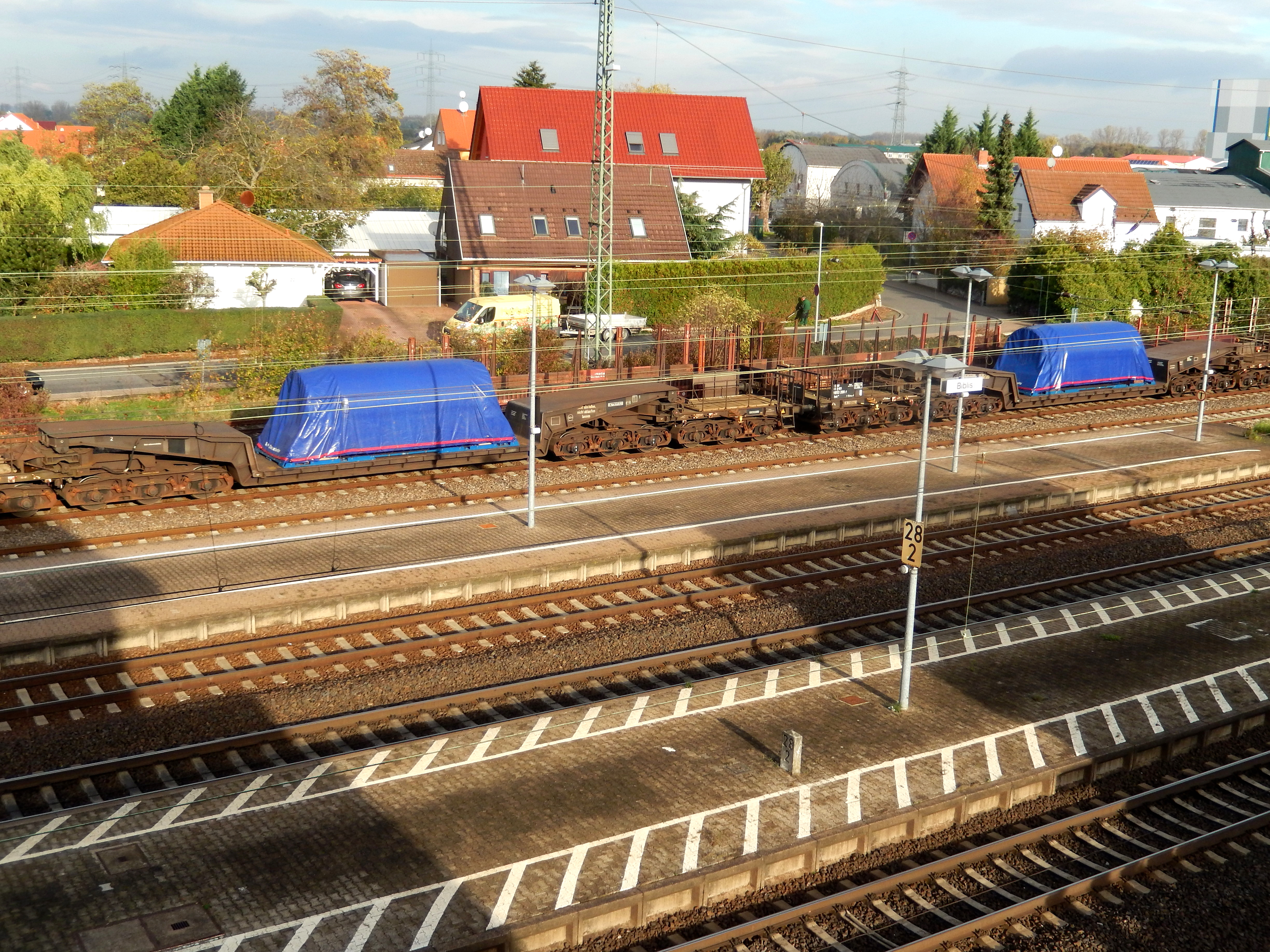 Zwei Castor-Behälter für den Atommülltransport aus dem stillgelegten Kernkraftwerk Biblis im Bahnhof Biblis. Bei der Beförderung von unbewachten Castor-Behältern mit der Eisenbahn werden zum Schutz von Personen, der Umwelt und Natur sowie von Gegenständen Schutzwagen zwischen den Castor-Behältern eingesetzt.